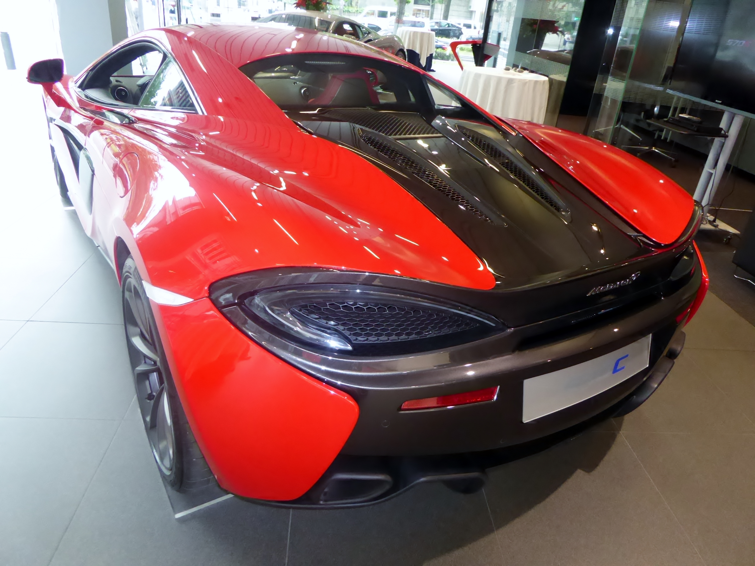 マクラーレン・540Cクーペをリアから撮影。